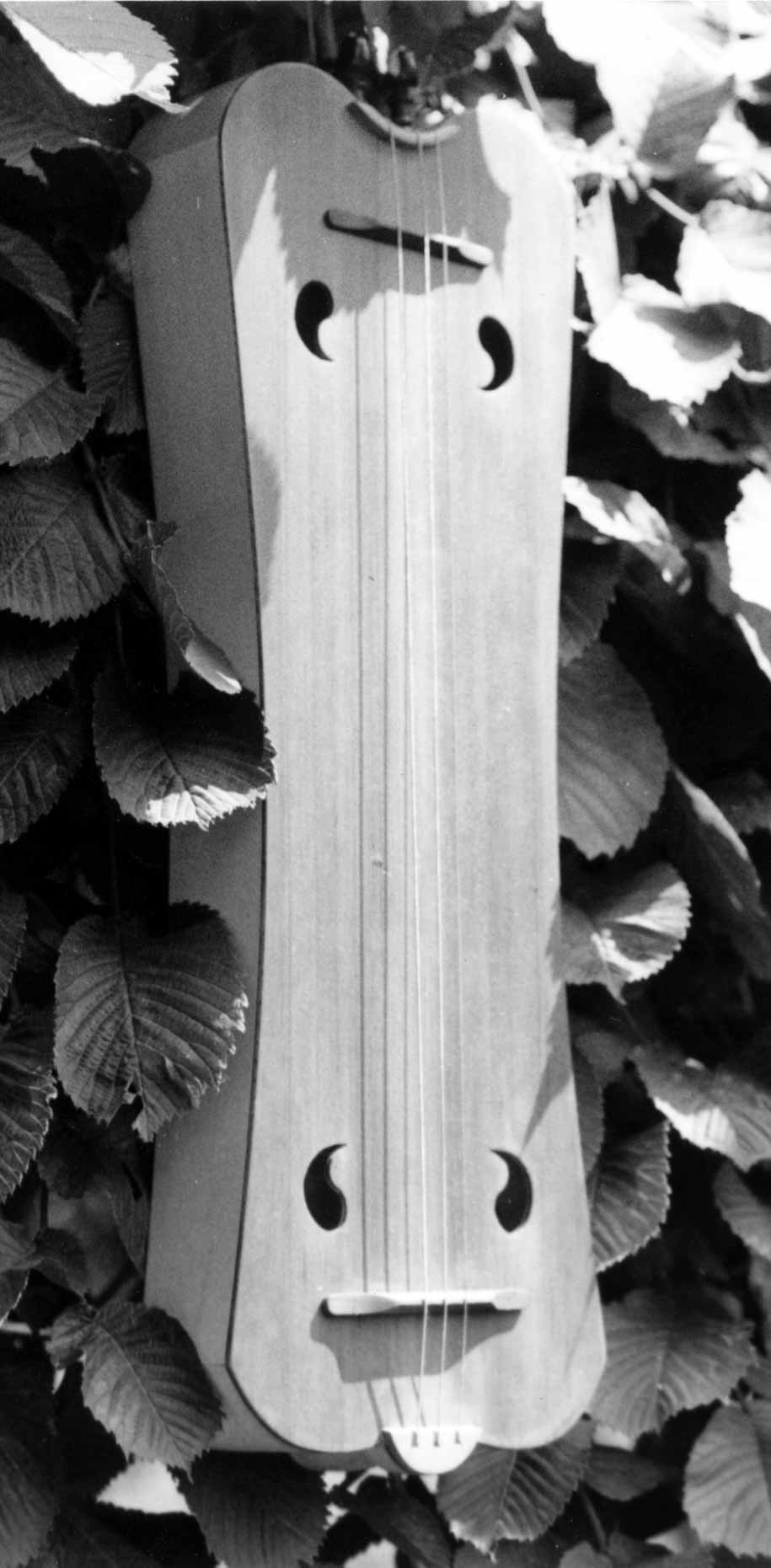 Tambourin de Béarn von Jürgen Lutschkowski. Bauplan von Professor Edgar Stahmer nach dem Fresco von Filippino Lippi aus der Kirche Santa Maria sopra Minerva, Rom.